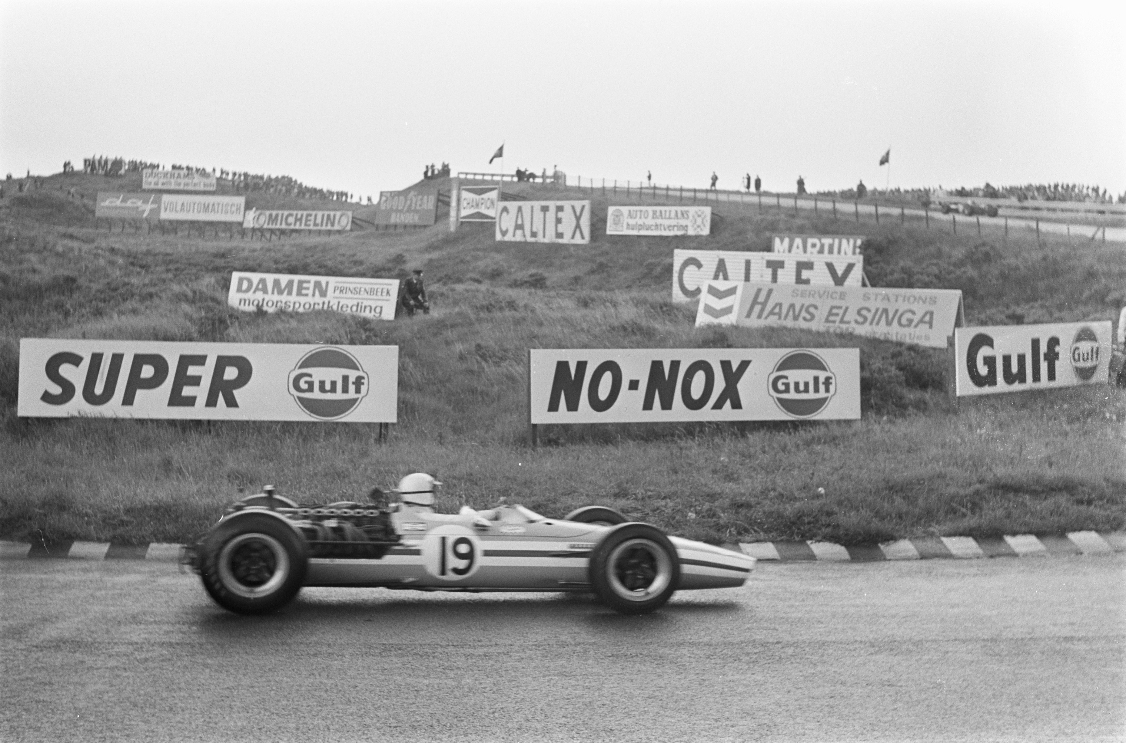 Collectie / Archief : Fotocollectie Anefo Reportage / Serie : [ onbekend ] Beschrijving : Grand Prix 68 Zandvoort .Joachim Bonnier. Veel reclameborden Annotatie : In de Tarzanbocht? Datum : 23 juni 1968 Locatie : Zandvoort Trefwoorden : autosport Persoonsnaam : Bonnier, Joachim Fotograaf : Evers, Joost / Anefo Auteursrechthebbende : Nationaal Archief Materiaalsoort : Negatief (zwart/wit) Nummer archiefinventaris : bekijk toegang 2.24.01.05 Bestanddeelnummer : 921-4593